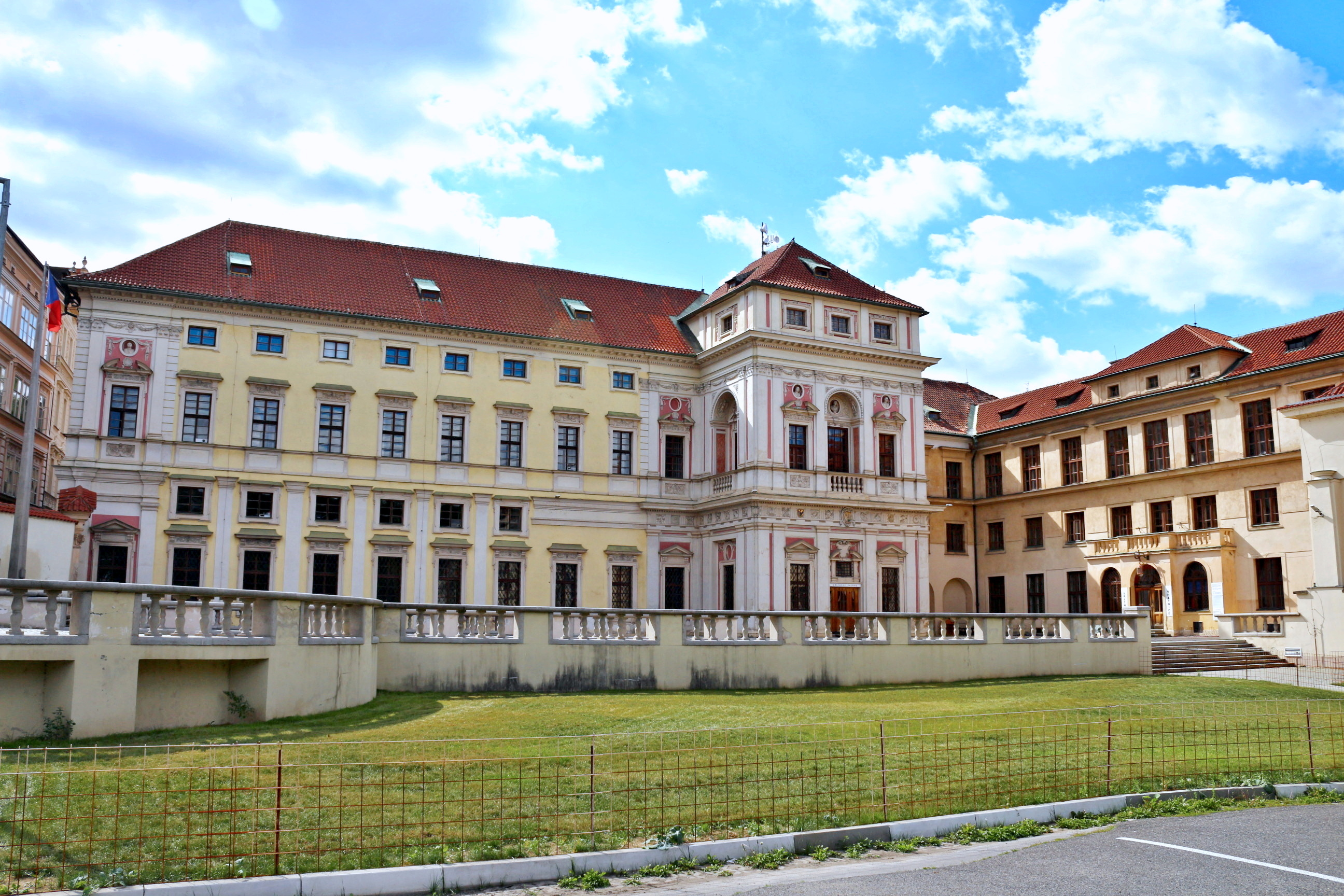 Palác Michnů z Vacínova